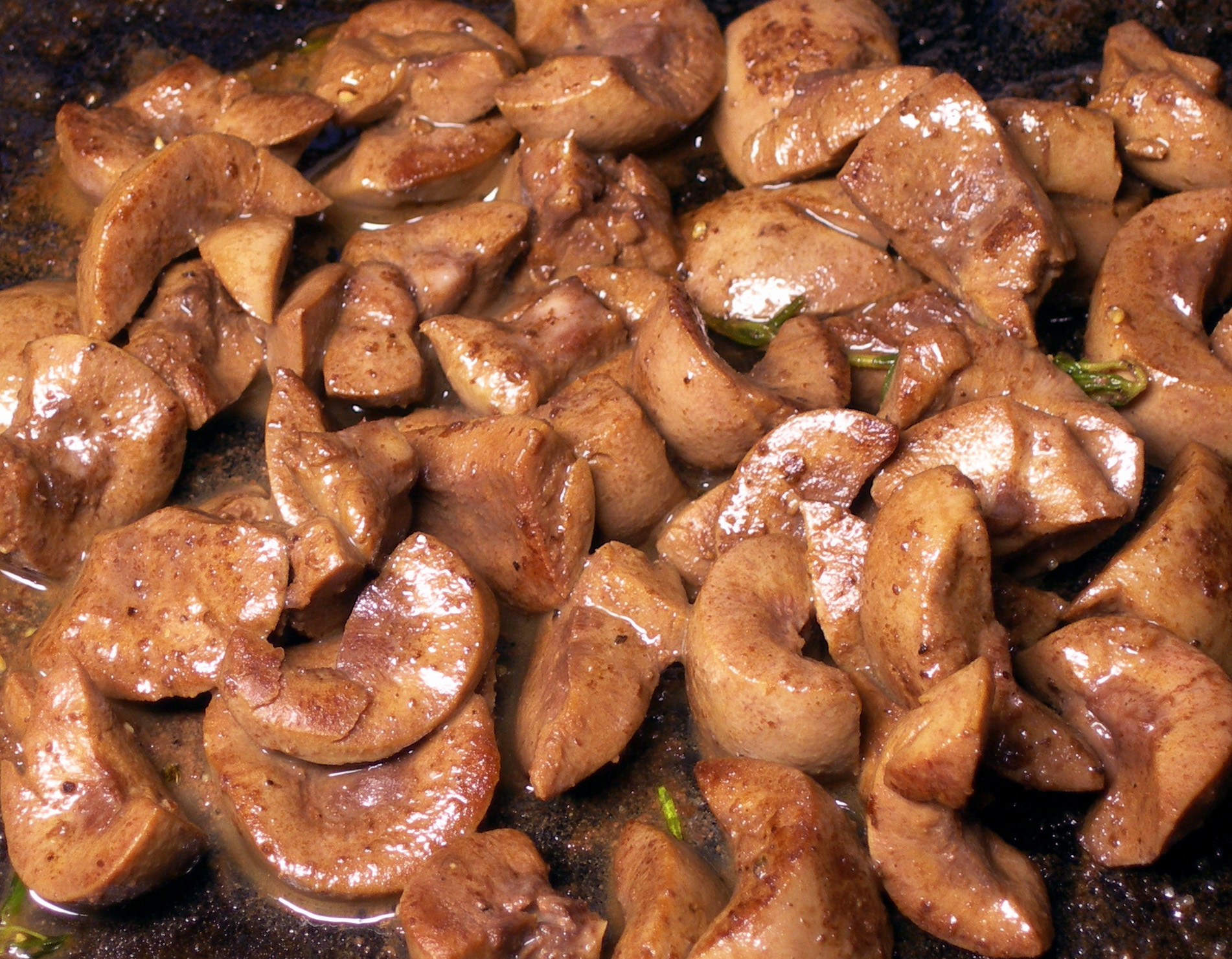 Lamb kidneys, baked